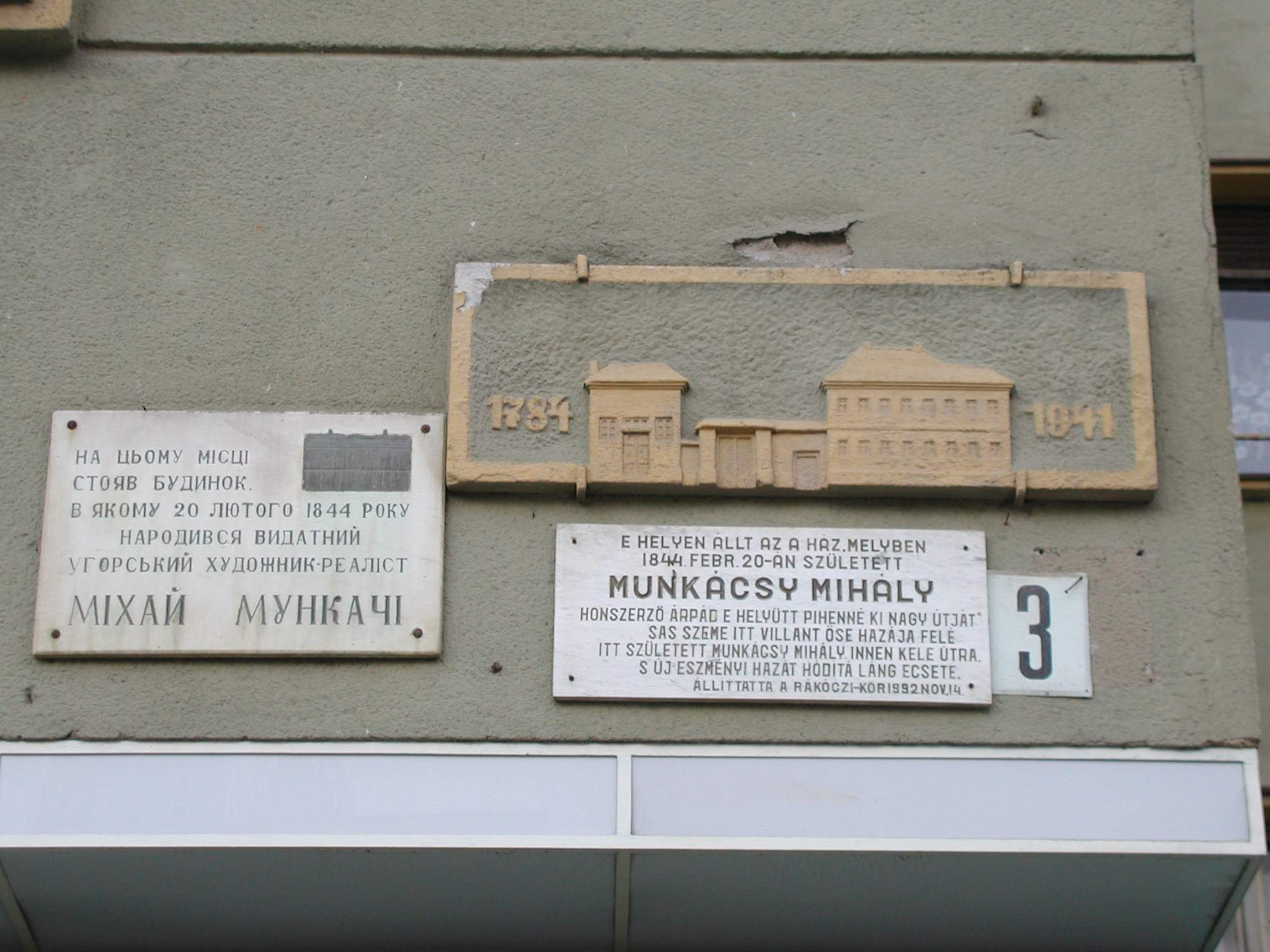 21-104-0021 Місце будинку, в якому народився видатний угорський художник-реаліст Міха Мункачі 1969 р. Мукачеве пл. Миру 48.442188, 22.719034